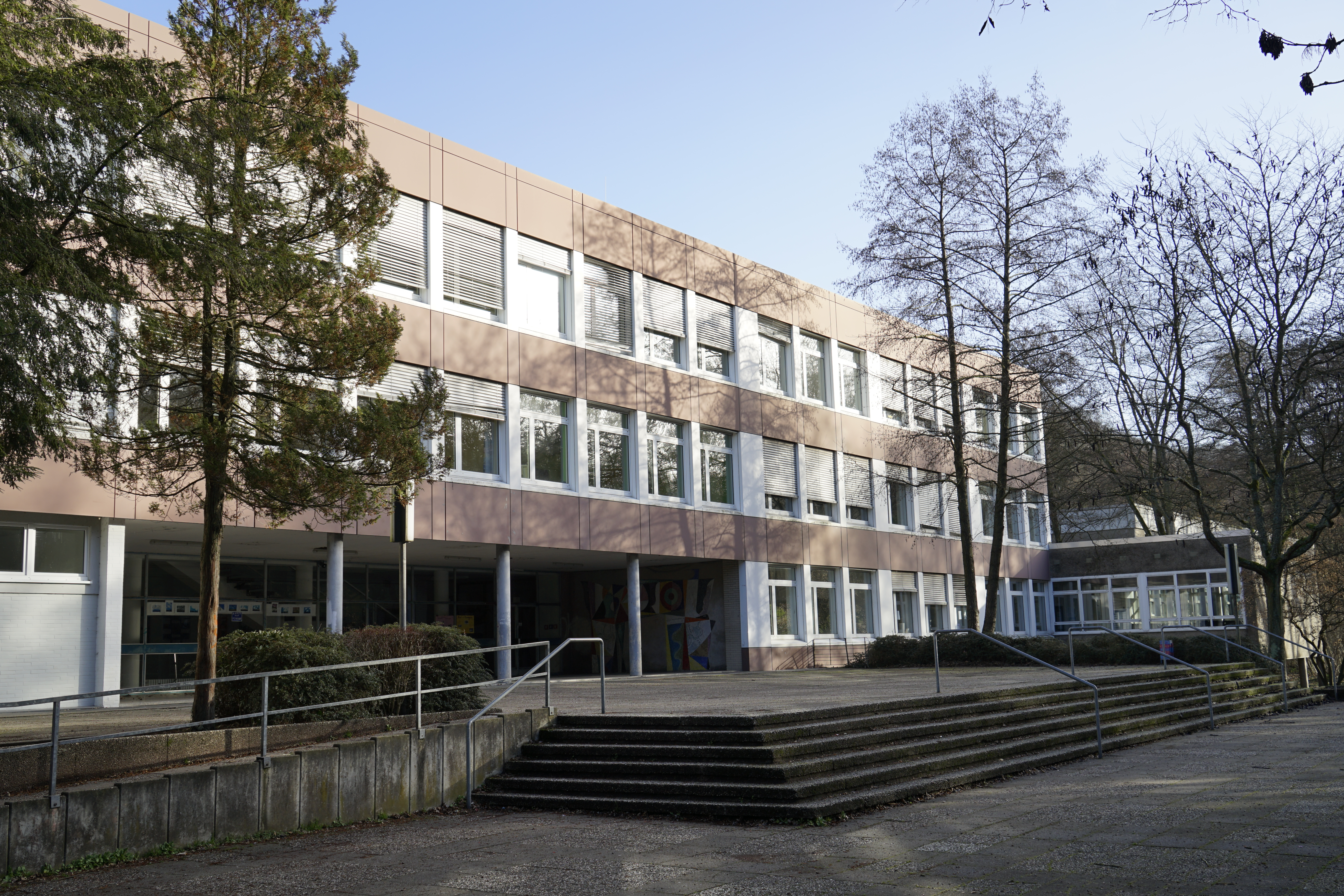 Rückseite des Gymnasiums mit Blick auf den Pausenhof und Treppenaufgang.